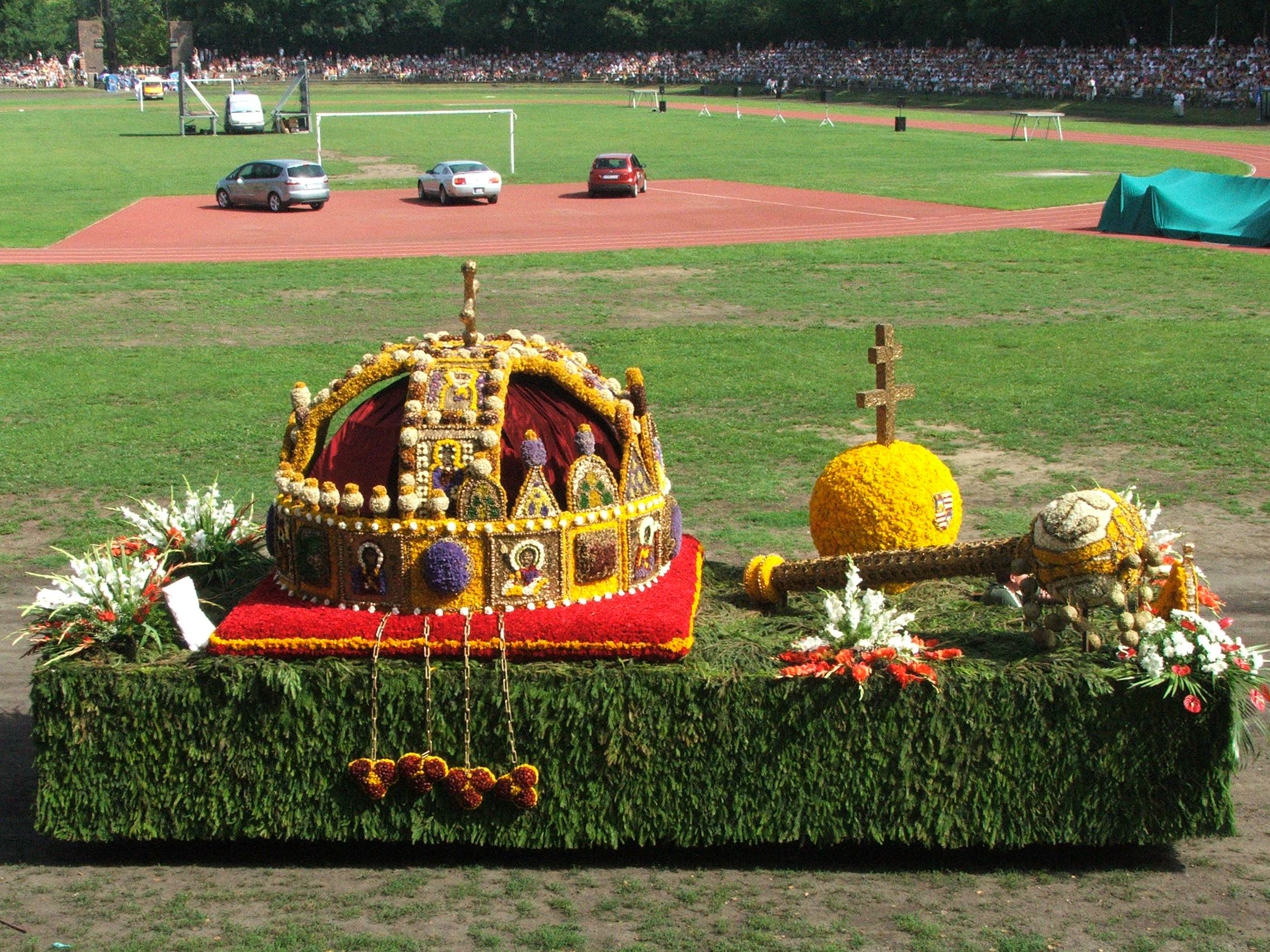 Königliche Insignien Nr. 4